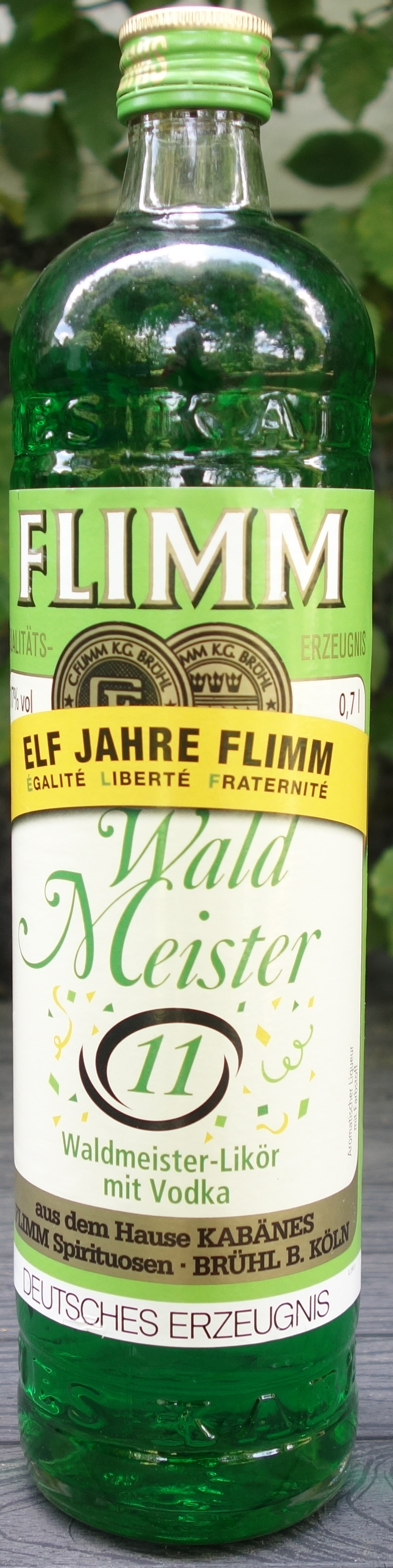 Sonder-Edition zum elfjährigen Jubiläum des Flimm WaldMeister 11